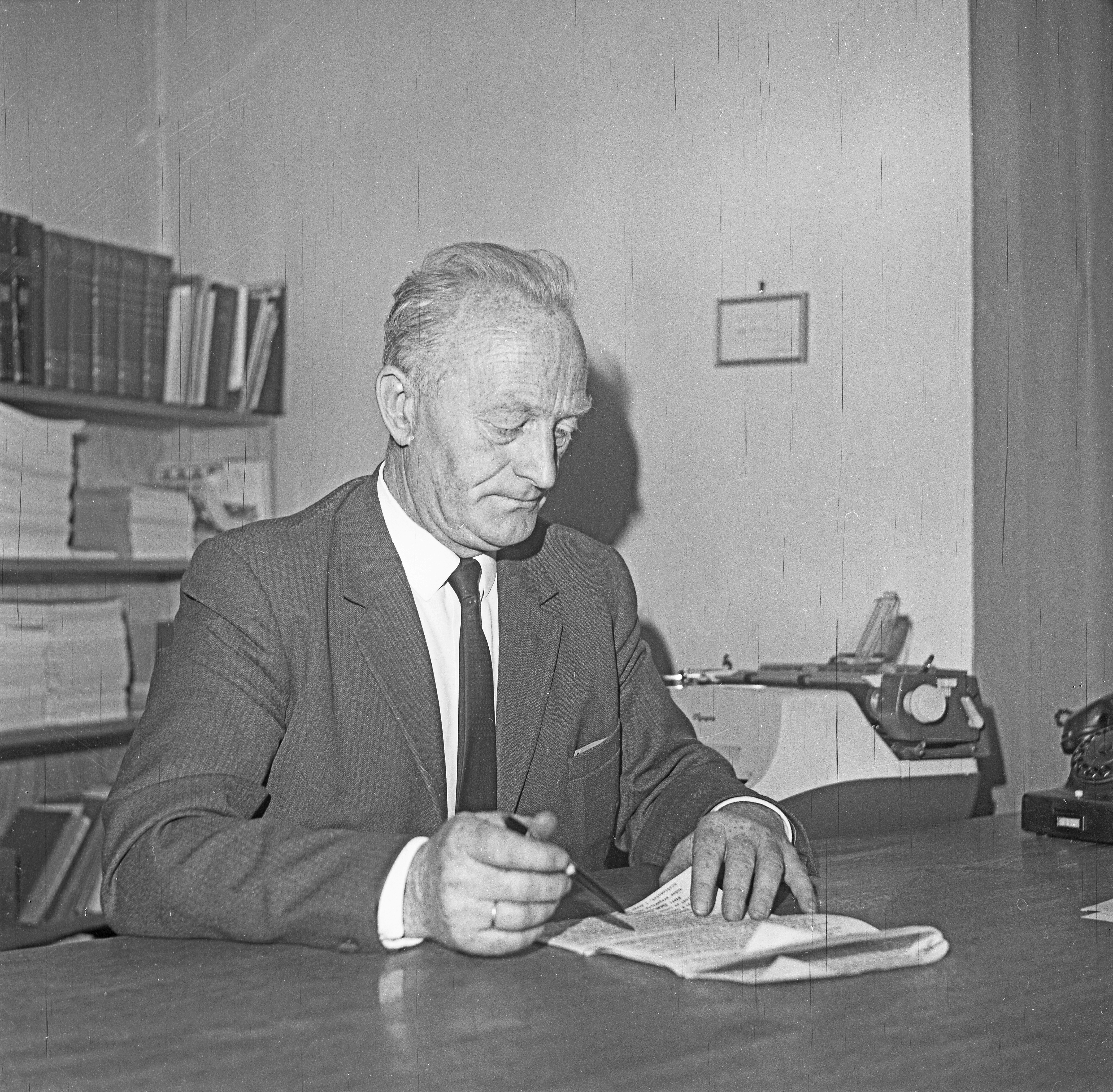 Format: Negativ 120 film Dato / Date: 1969 Fotograf / Photographer: Eirik Sundvor (1902 - 1992) Sted / Place: Bergen, Hordaland Wikipedia: Arthur Berg (1916 - 1998) Hvem er hvem? (1973): Arthur Berg (1916 - 1998) Wikipedia: Dagen Wikipedia: Folkebevegelsen mot EEC Eier / Owner Institution: Trondheim byarkiv, The Municipal Archives of Trondheim Arkivreferanse / Archive reference: Tor.H43.Bxx.F14986b Merknad: Redaktør i avisa Dagen, fotografert i forbindelse med avisas 50-årsjubileum i 1969. BERG Arthur Bjarne, redaktør, Bergen, f. 8. april 1916, sønn av gårdbr. Ole B. (1888-1934) og Camilla Kornbrekke, f. 1889. Gift 1) 1943 Eva Gregersen (22. feb. 1917-1. aug. 1967), dtr. av disp. Johan Emanuel G. (1876-1929) og Ingrid Schöpp, f. 1893. 2) 1970 Marie Wilhelmsen, f. 24. april 1927, dtr. av kjøpm. Oscar W. og Lilly Frønsdal. St. 1936, 3. Div. befalssk. 1940, cand. theol. (Menigh.fak.) 1941, practicum 1947. Feltprest og troppsoff. Sverige 1944, div.-prest 1945, red.sekr. Samenes Venn 1950, lærer Nordhordland Ungd.sk. 1955, red. Dagen siden 1956. Medl. Frivillige Kirkeråds utredn.komm. av 1969. Skr.: Vi er alle prester, 1953, Contra Houm, 1966, l stridens hete, Kjell Bondevik, 1969. [Kilde: Hvem er hvem? 1973]